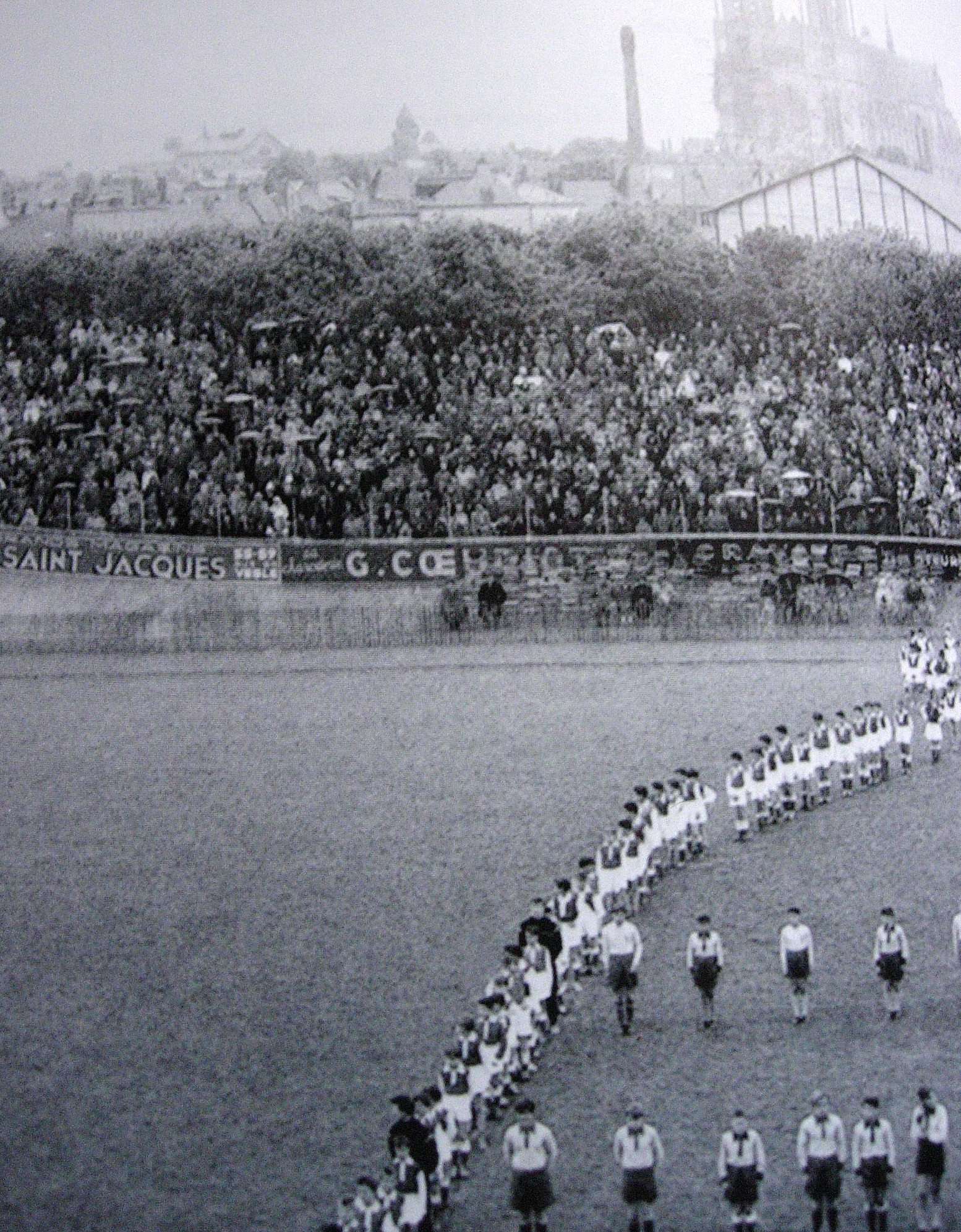 Auguste Delaune, Ende der 1930er